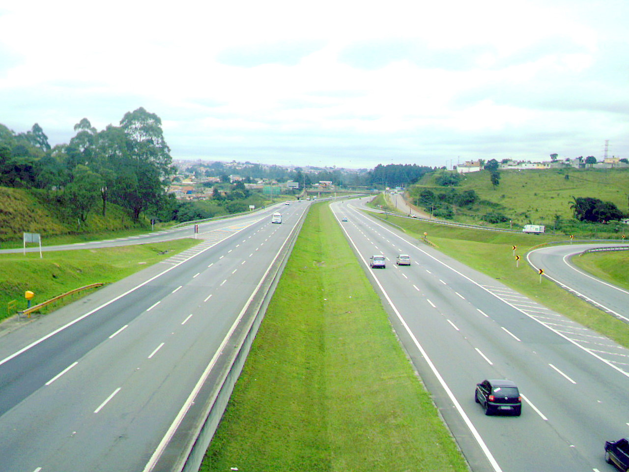 Rodovia Aryton Senna, Itaquaquecetuba